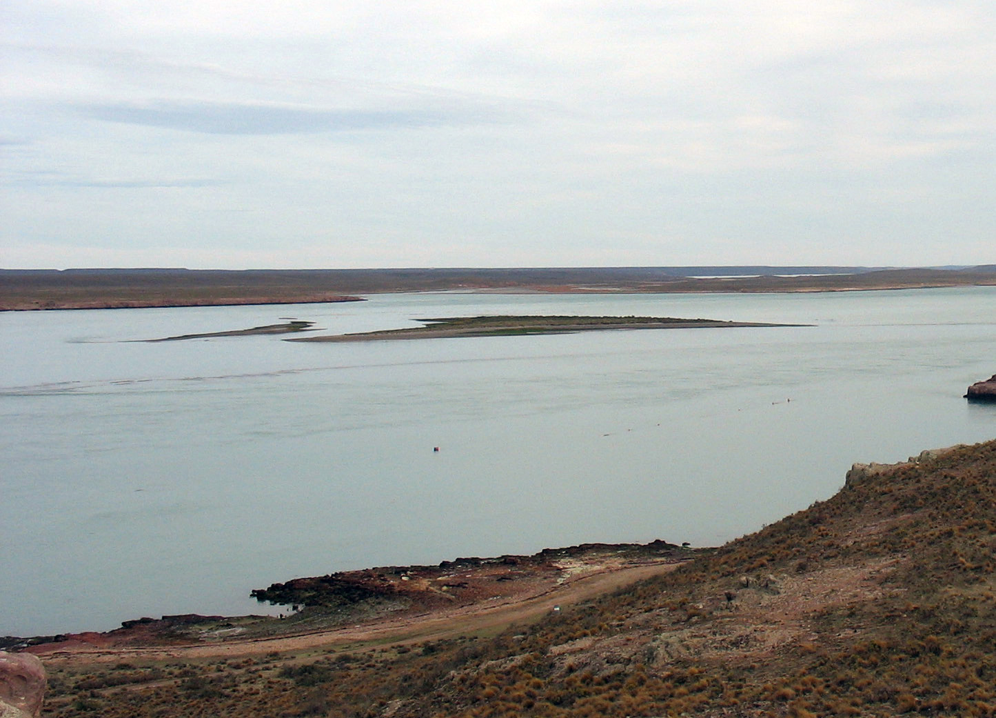 Vista desde el noreste de la isla de los Pájaros (Ría Deseado, Santa Cruz, Argentina)